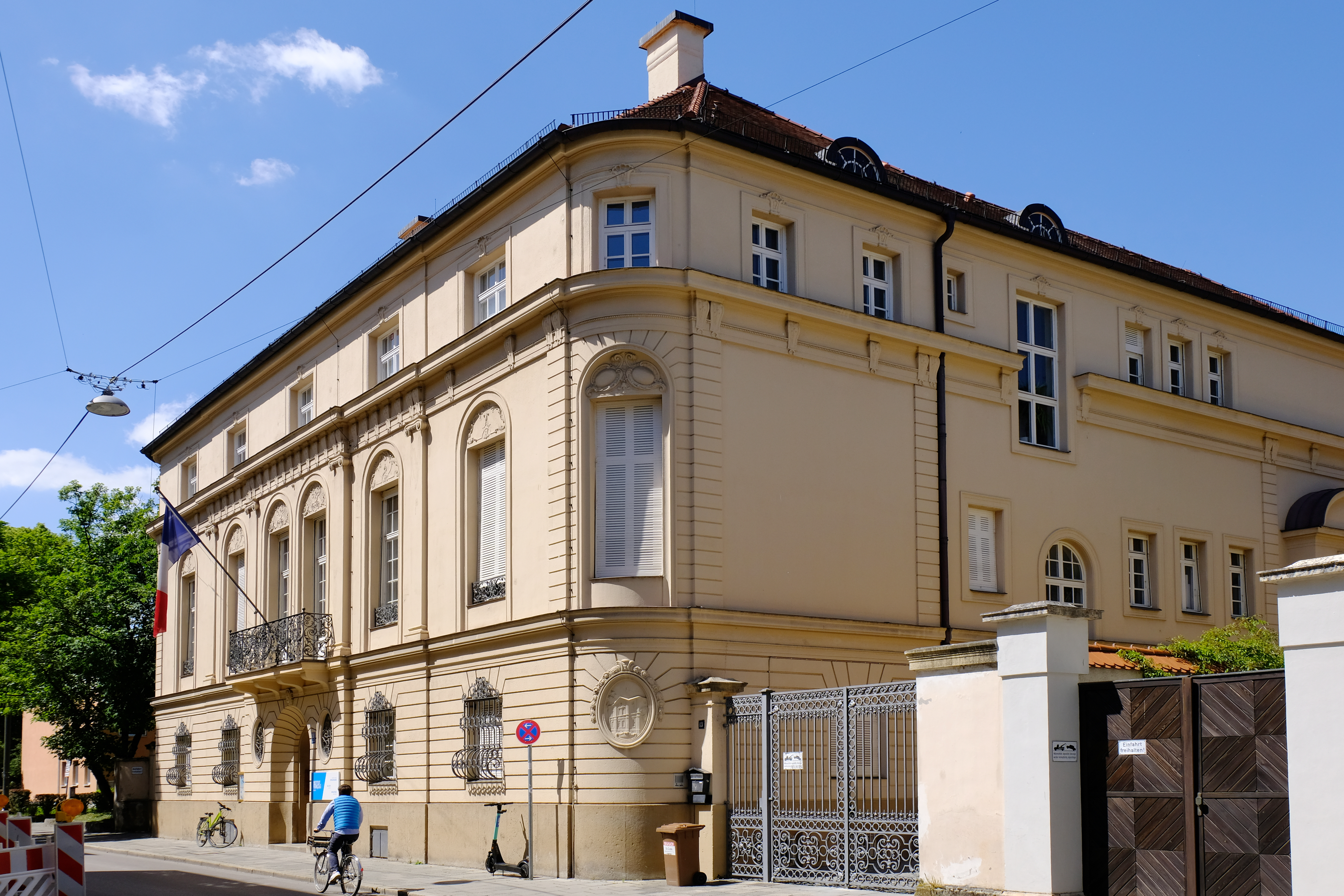 Das ehemalige Palais Seyssel d’Aix in München, heute Sitz des Institut Français, Ansicht von der Kaulbachstraße aus (2020)